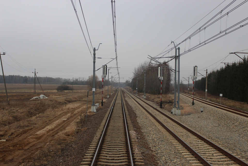 Zjazd z linii kolejowej nr 4 na linię nr 575